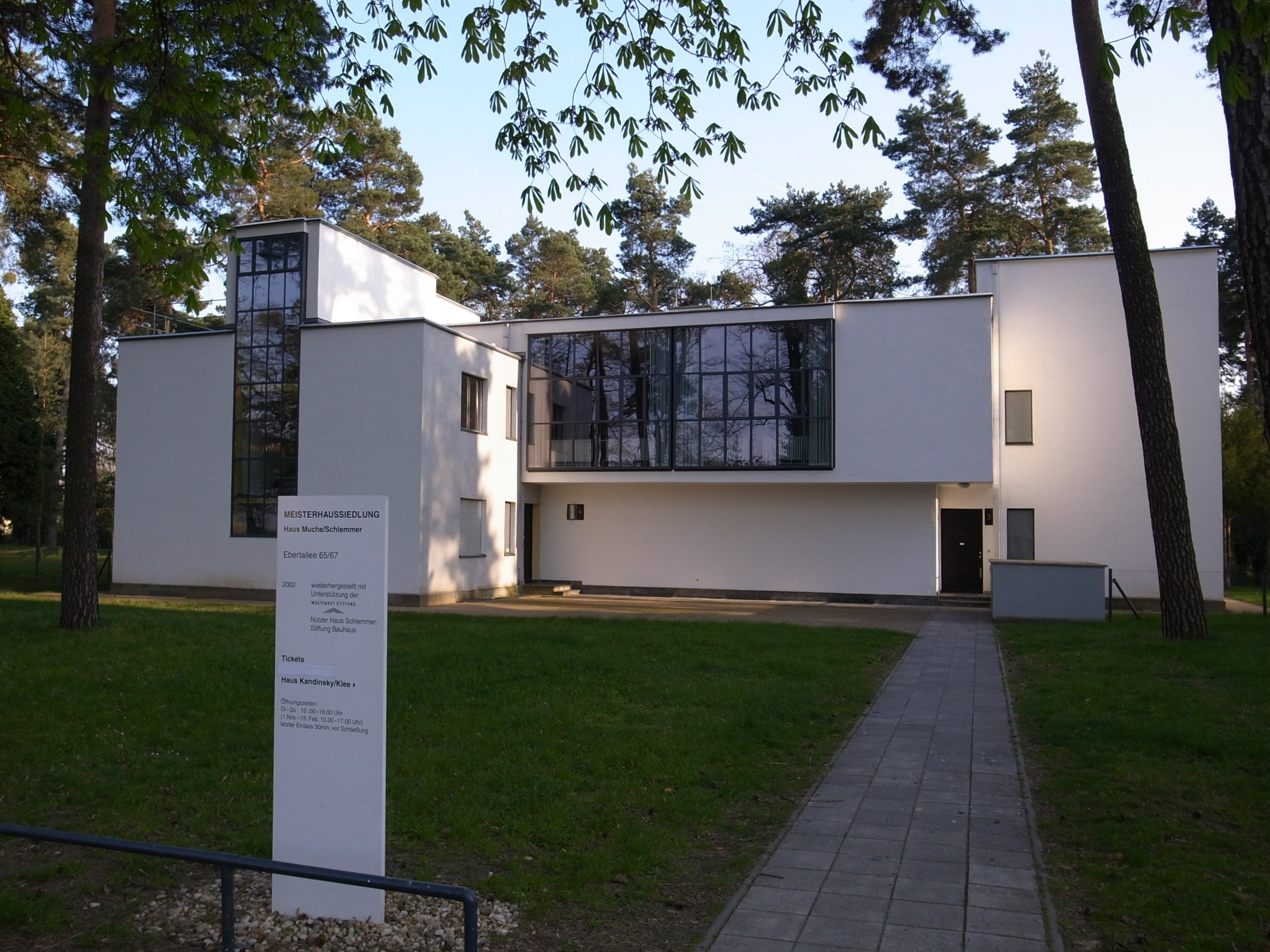 Dessau Meisterhaussiedlung. Haus Muche/Schlemmer.